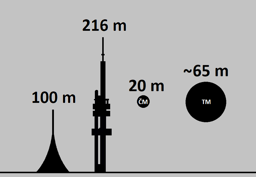 Velikostní srovnání (před vstupem do atmosféry) Čeljabinského meteoritu (ČM) a Tunguzského meteoru (TM) s vysílačem na Ještědu a Žižkovskou věží.